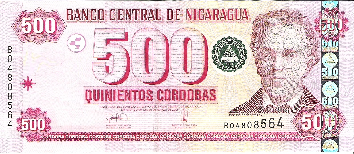 C$500 córdoba showing José Dolores Estrada